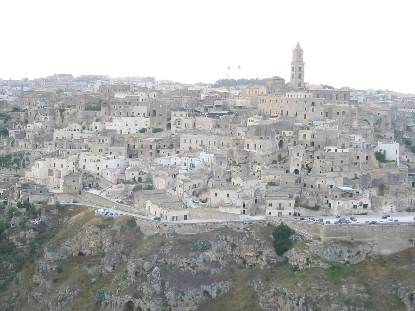 Matera, Italia